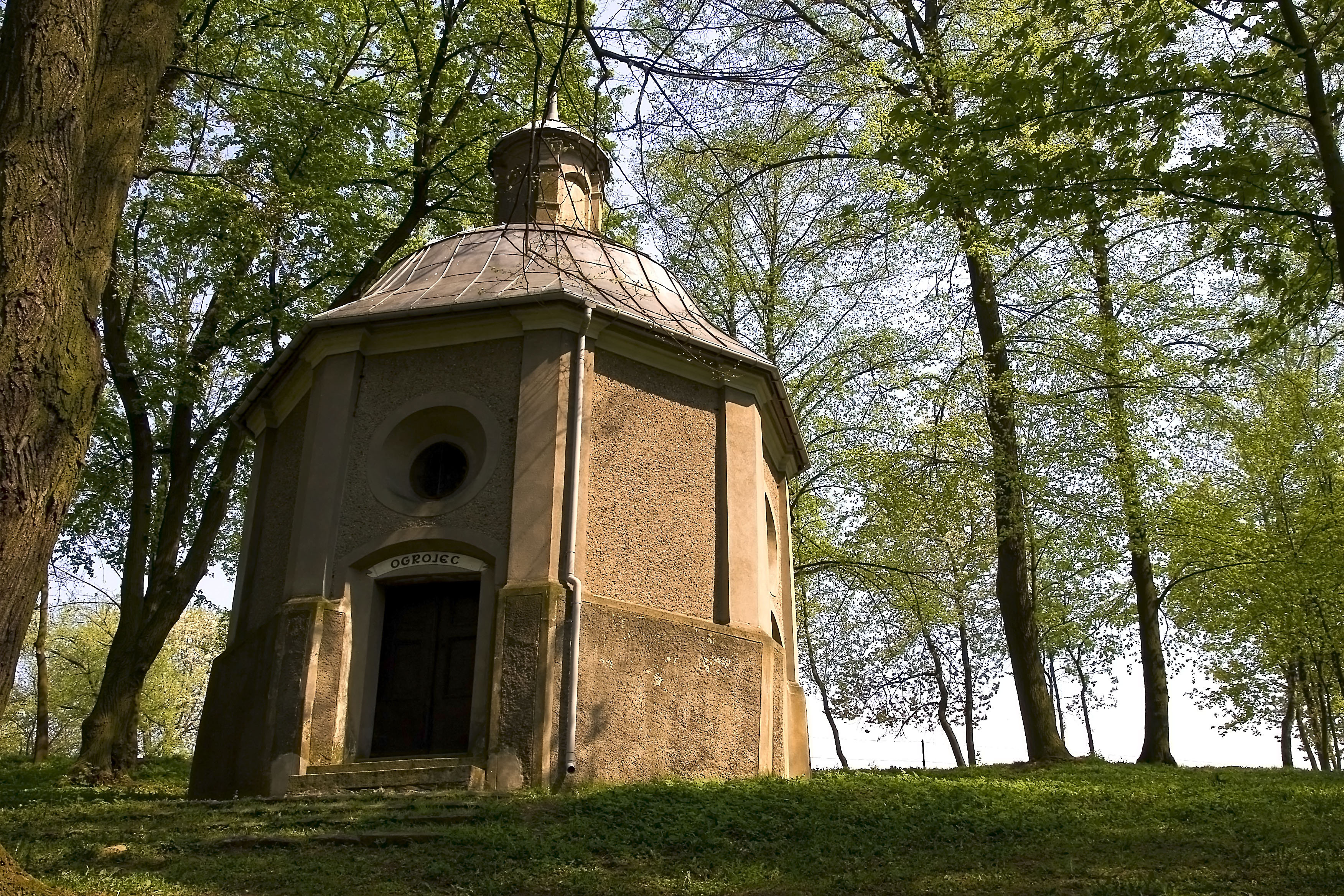 Góra św. Anny, kaplica Ogrójec, Gmina Leśnica, powiat strzelecki